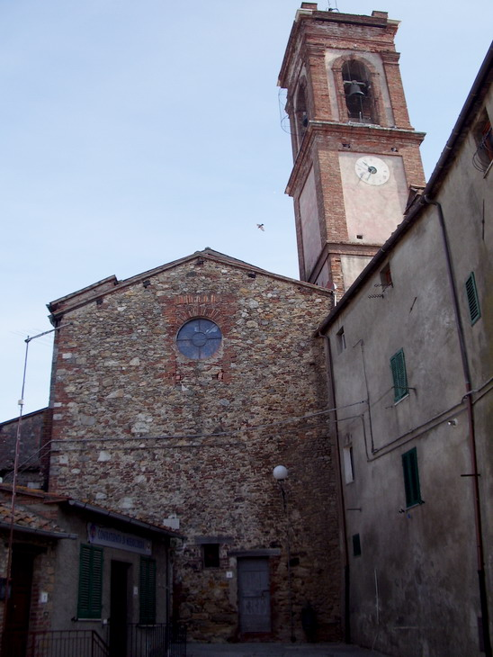 Ex facciata anteriore della Chiesa di Santa Maria in Montibus a Civitella Marittima (GR)